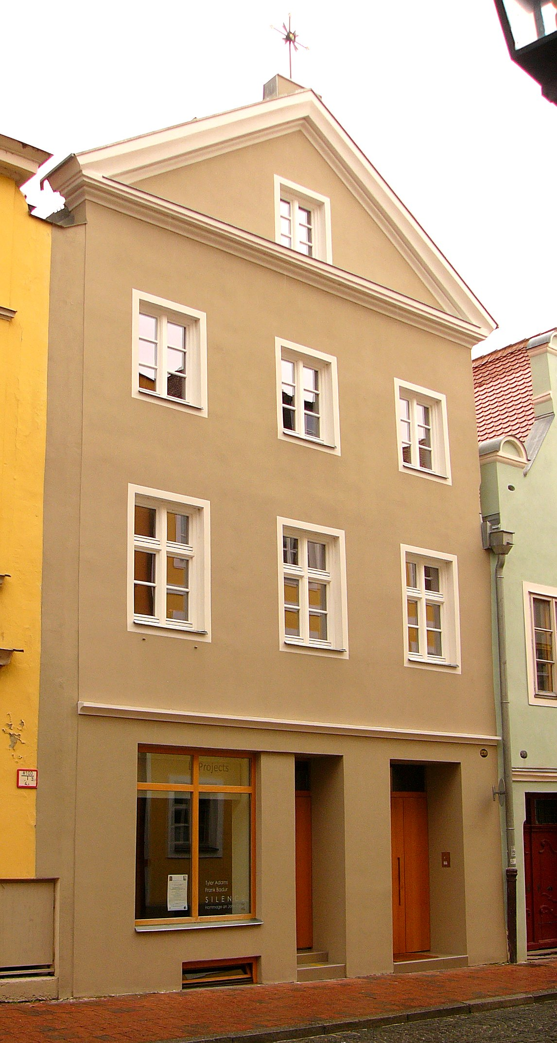 Dreigeschossiger Satteldachbau mit kräftig profiliertem Dreiecksgiebel, im Kern mittelalterlich, in der Barockzeit aufgestockt und ausgebaut, 17. /18. Jahrhundert, Überformungen im 19. JahrhundertThis is a photograph of an architectural monument.